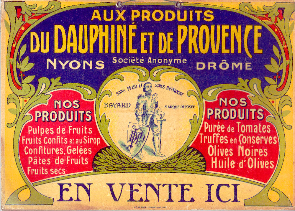 Nyons produits régionaux